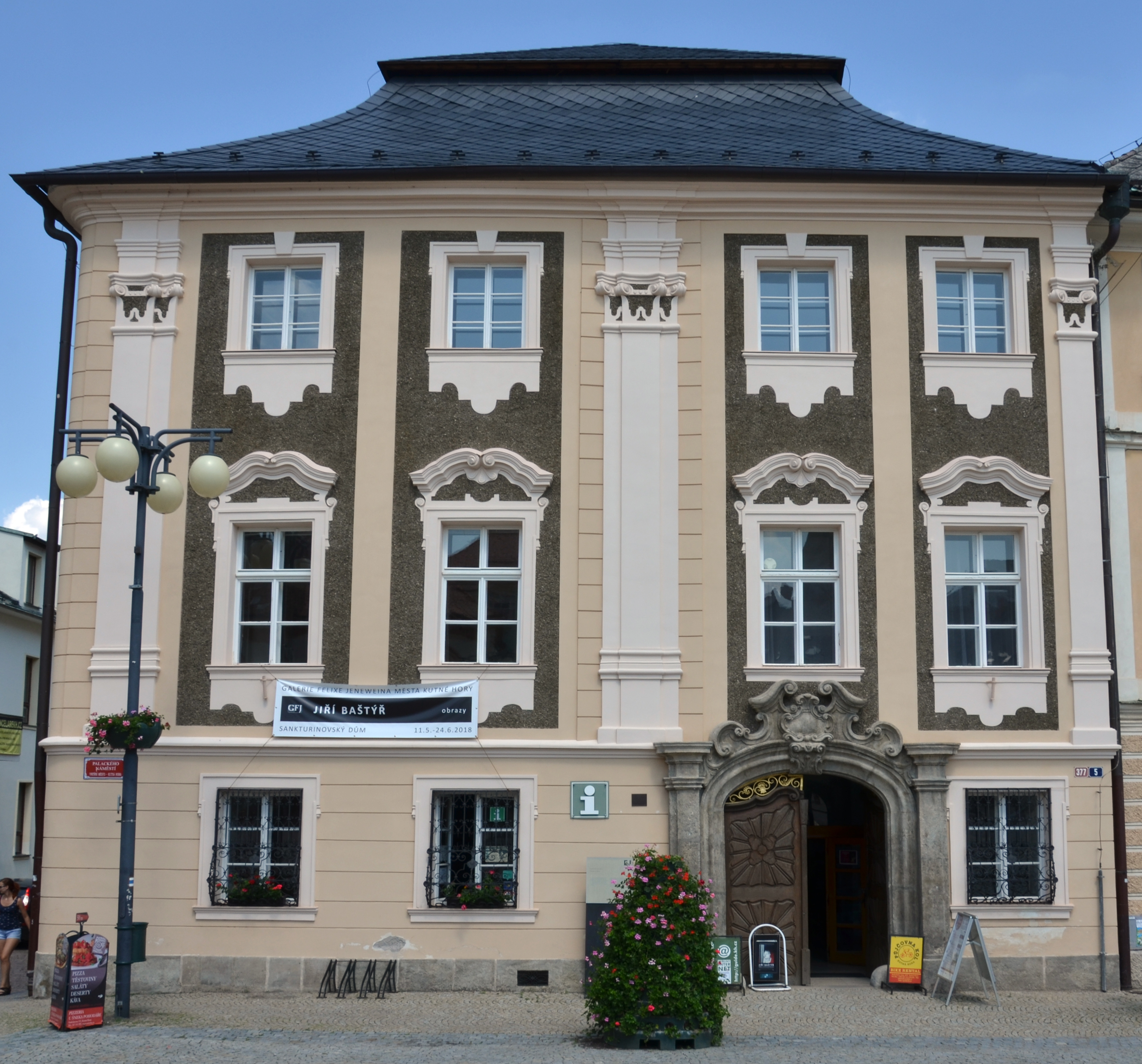 Galerie Felixe Jeneweina města Kutné Hory, Sankturinovský dům, Palackého náměstí 377, Kutná Hora